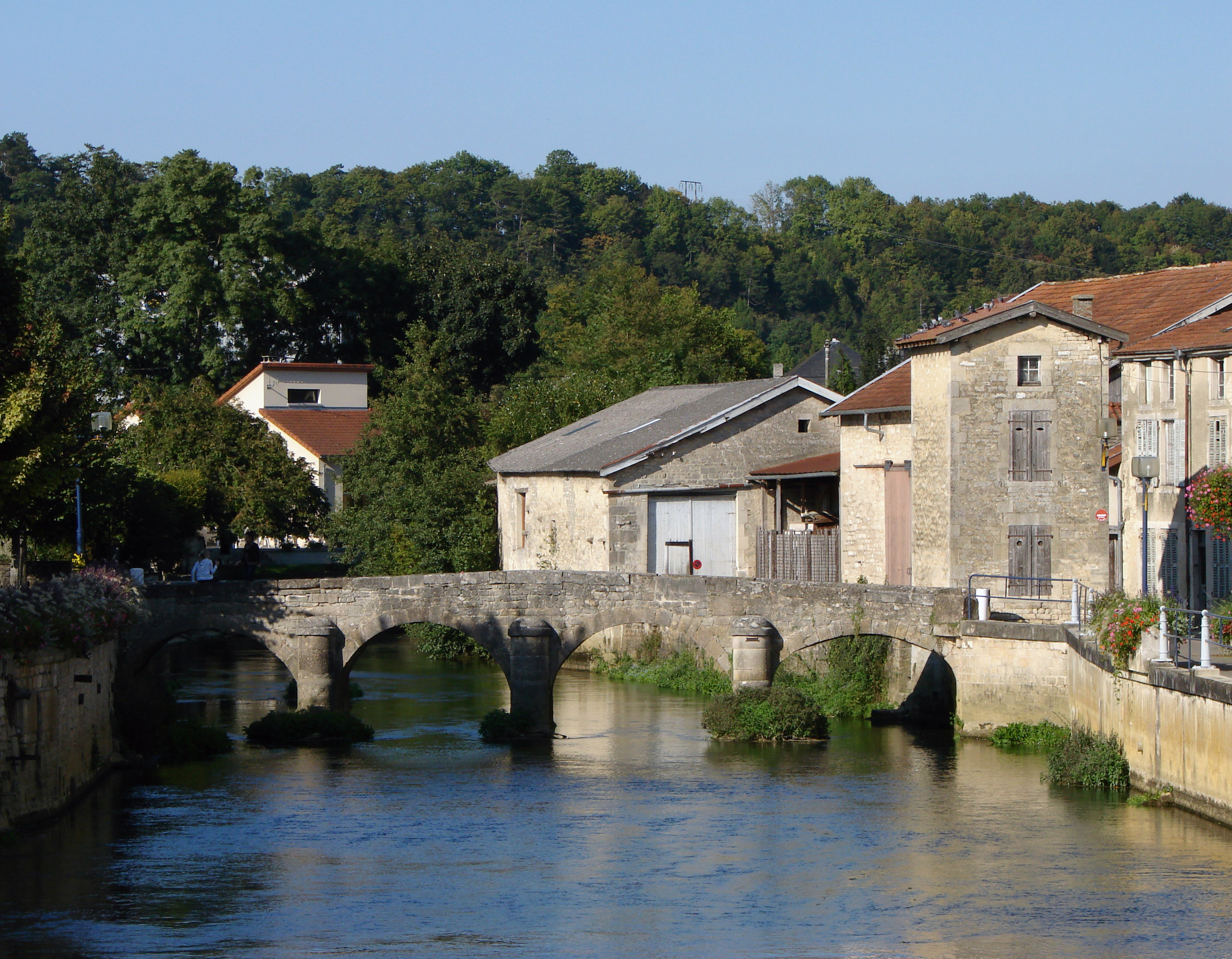 Vue de Joinville en Haute-Marne.